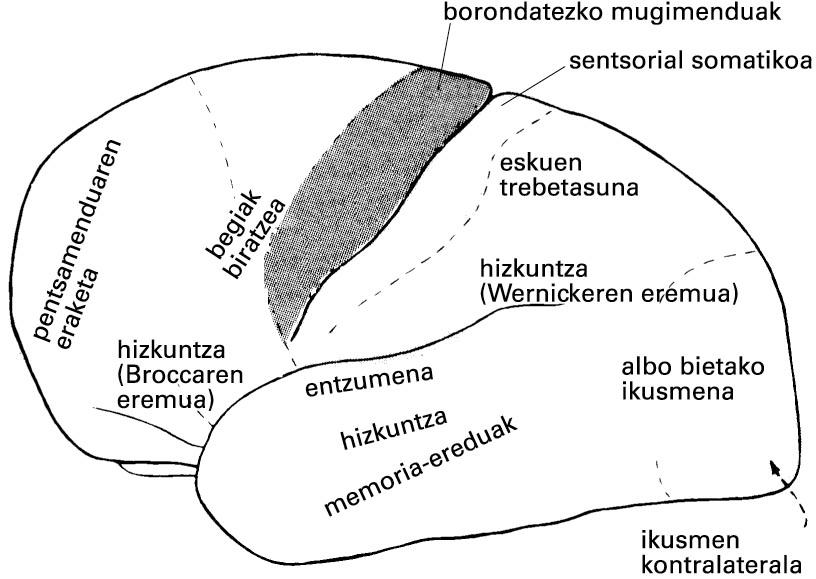 Garun-azaleko eremu funtzionalen kokapena